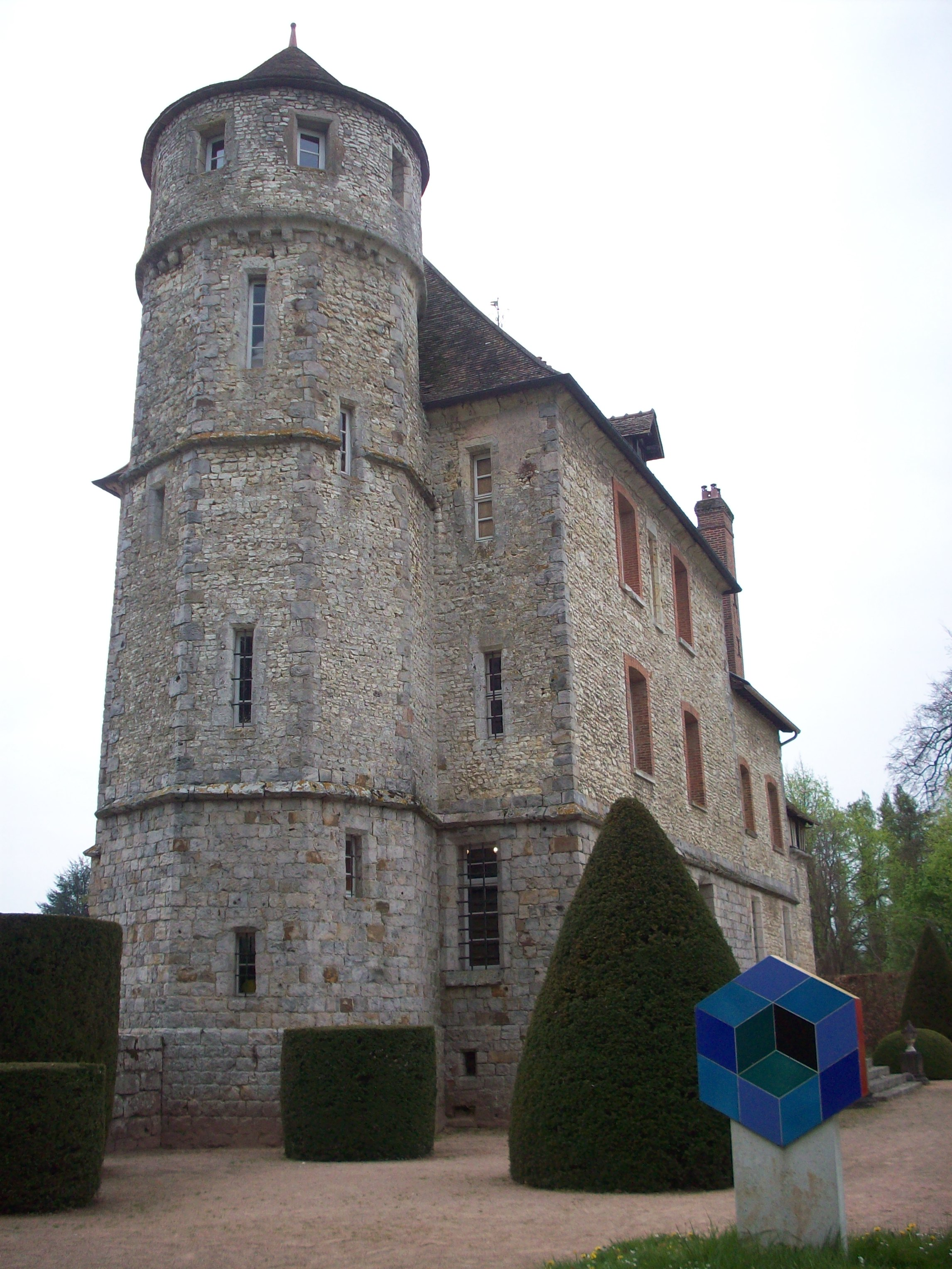 Château de Vascœuil.